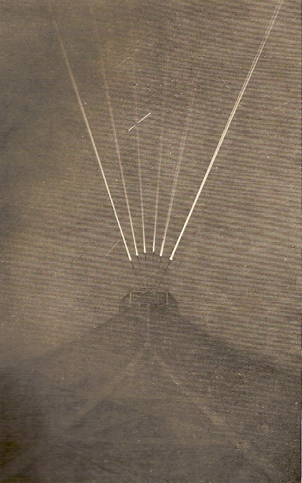 La nuit (1914) une réaction très lumineuse d'ionisation était visible de la haute tension, se manifestant par un « effet de couronne » sous forme d'une gaine lumineuse bleuâtre autour des fils d'antenne TSF de la tour Eiffel. (dû à l'ionisation de l'air).